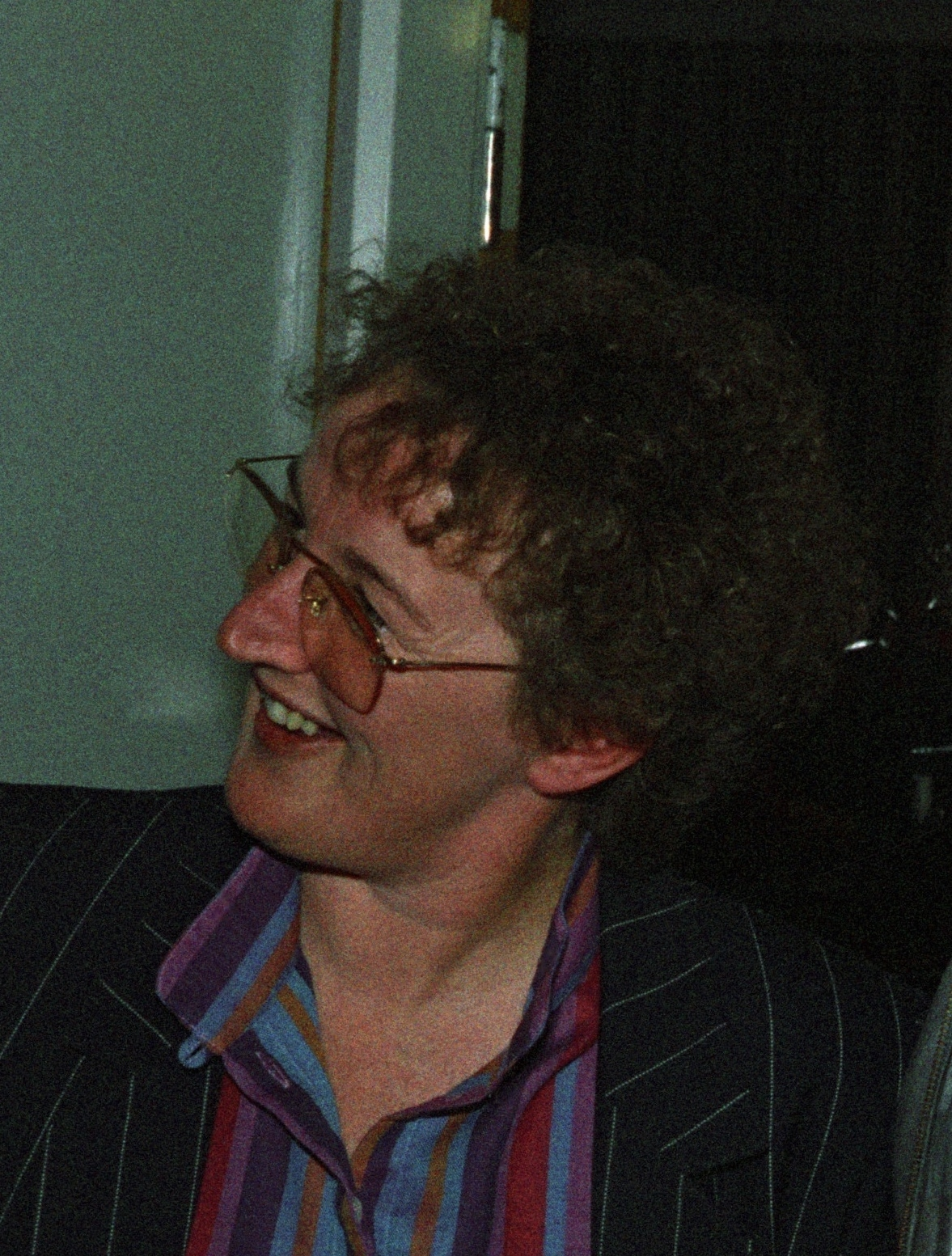 Thea Bock, Hamburger Bürgerschaftsabgeordnete